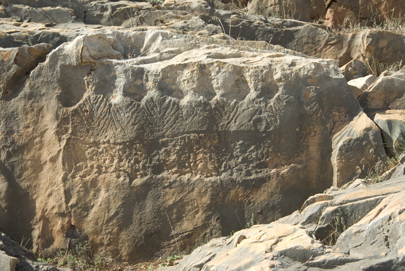 Felsrelief der Dii Mauri in Chimtou, Tunesien